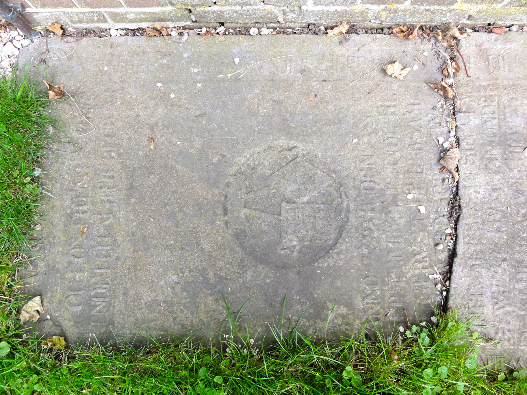 grafzerk bij de kerk vanHiaure, rijksmonument